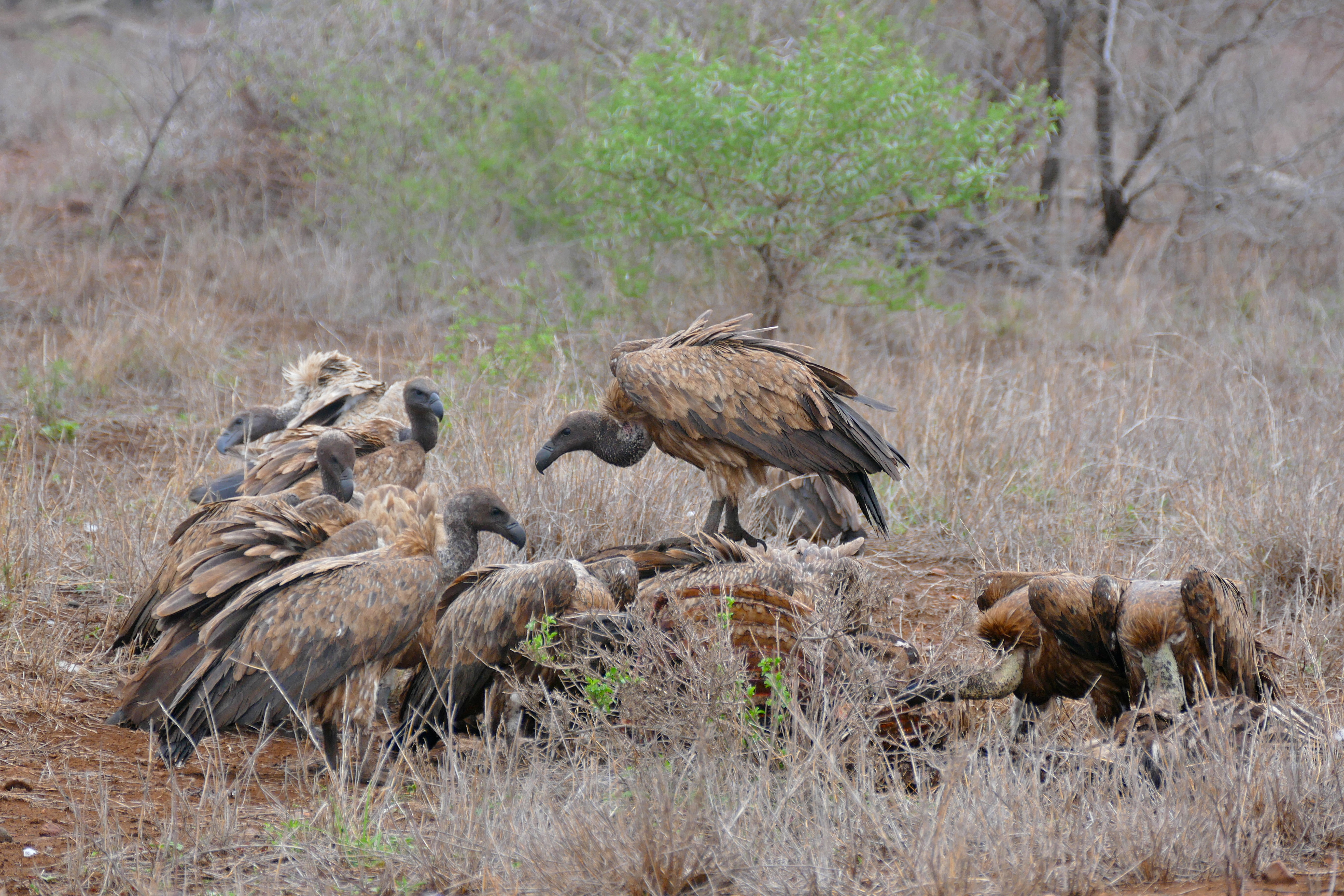 S100 Road East of Satara, Kruger NP, Mpumalanga, SOUTH AFRICA